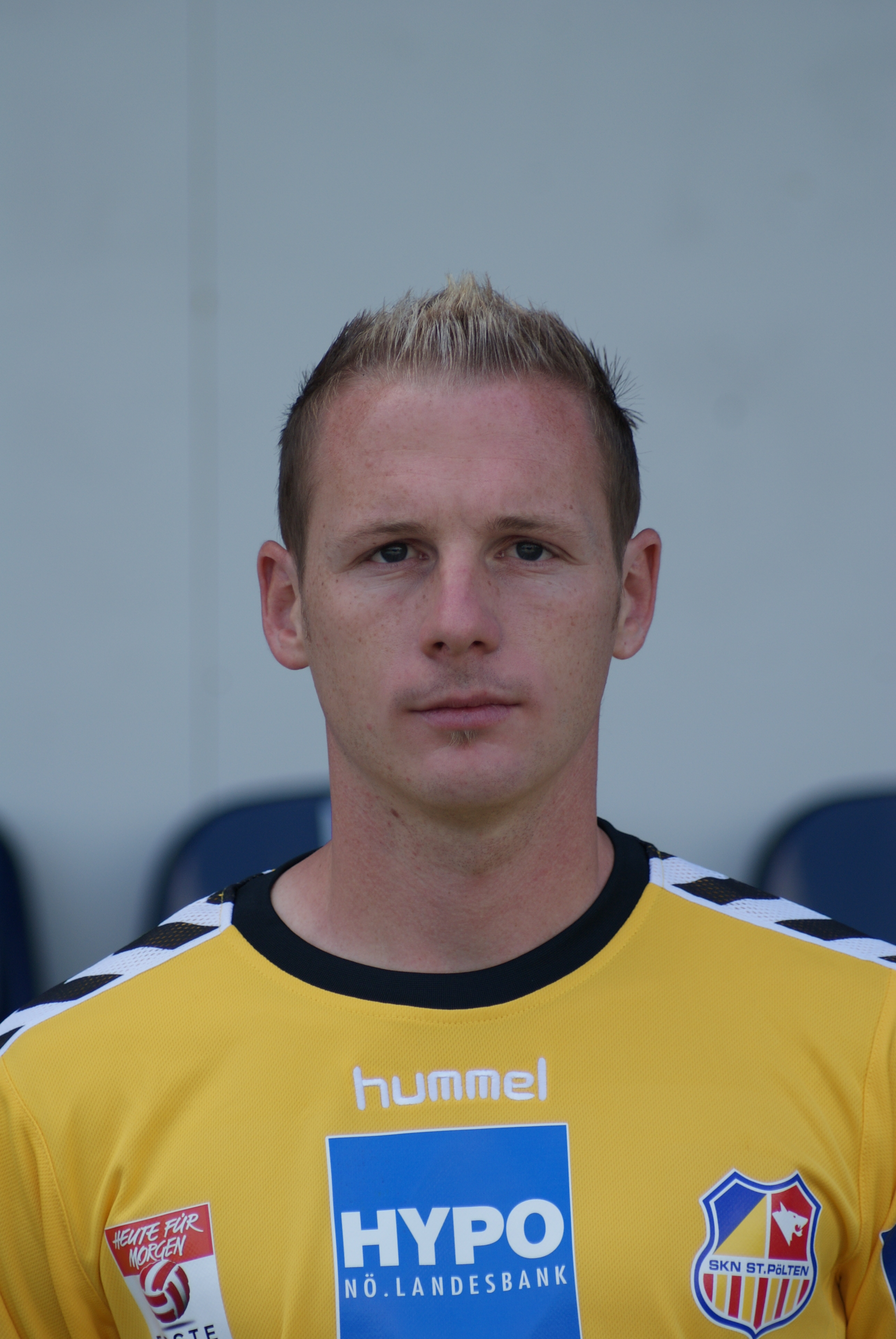 Jochen Fallmann, SKNV St. Pölten.